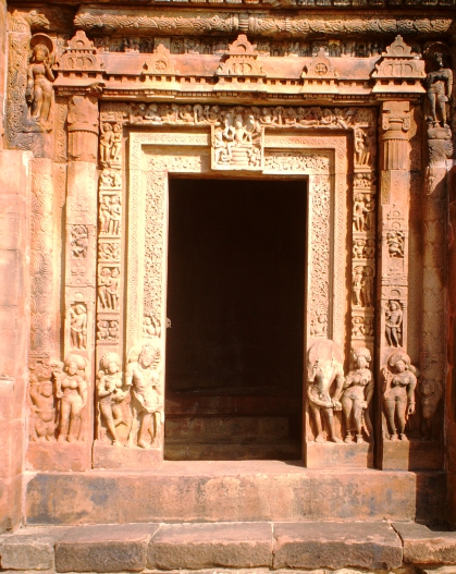 Deogarh, Dasavatara-Tempel, Türportal